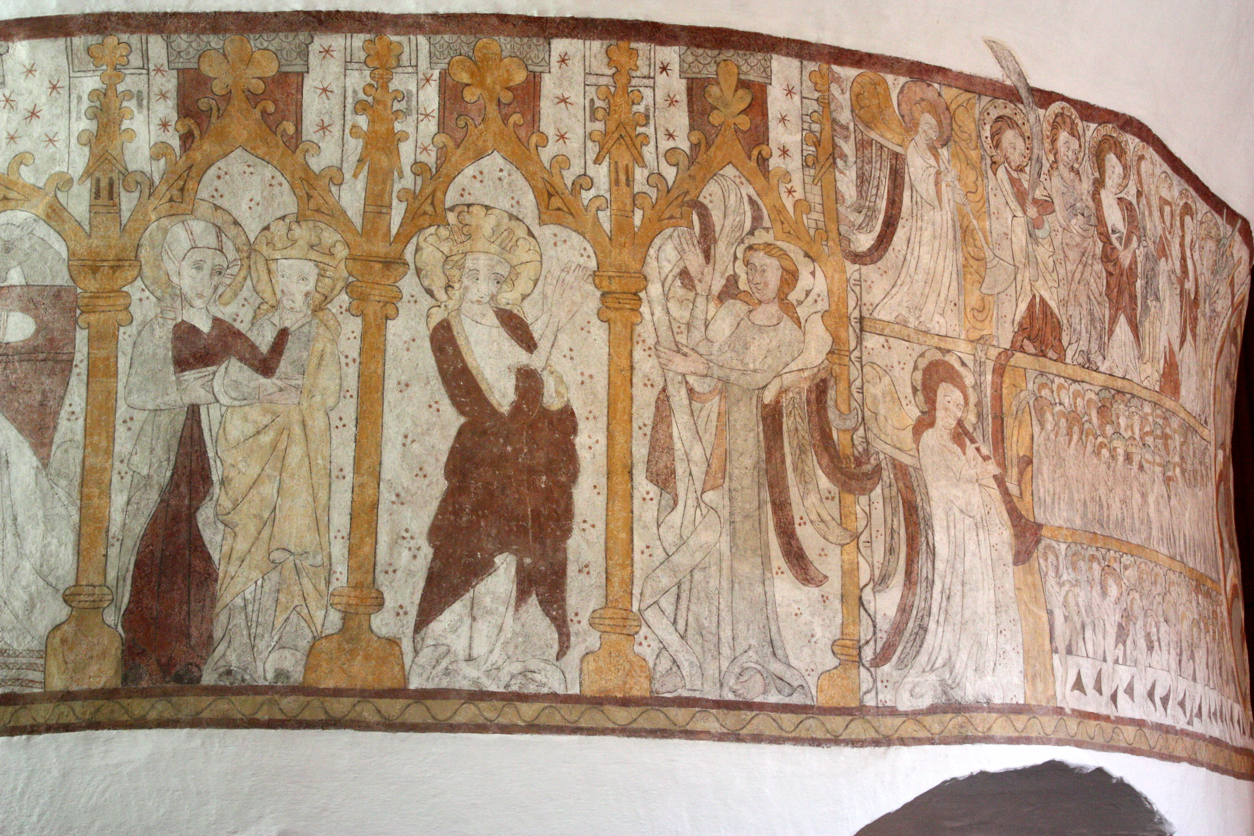 Østerlars kirke , Bornholm, August 2009